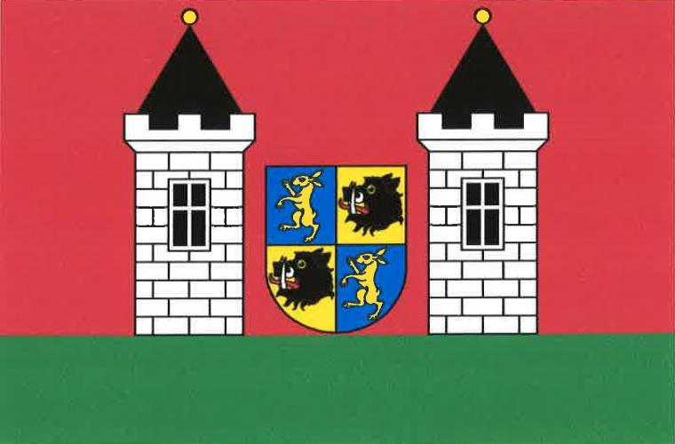 vlajka,Vraný , okres Kladno